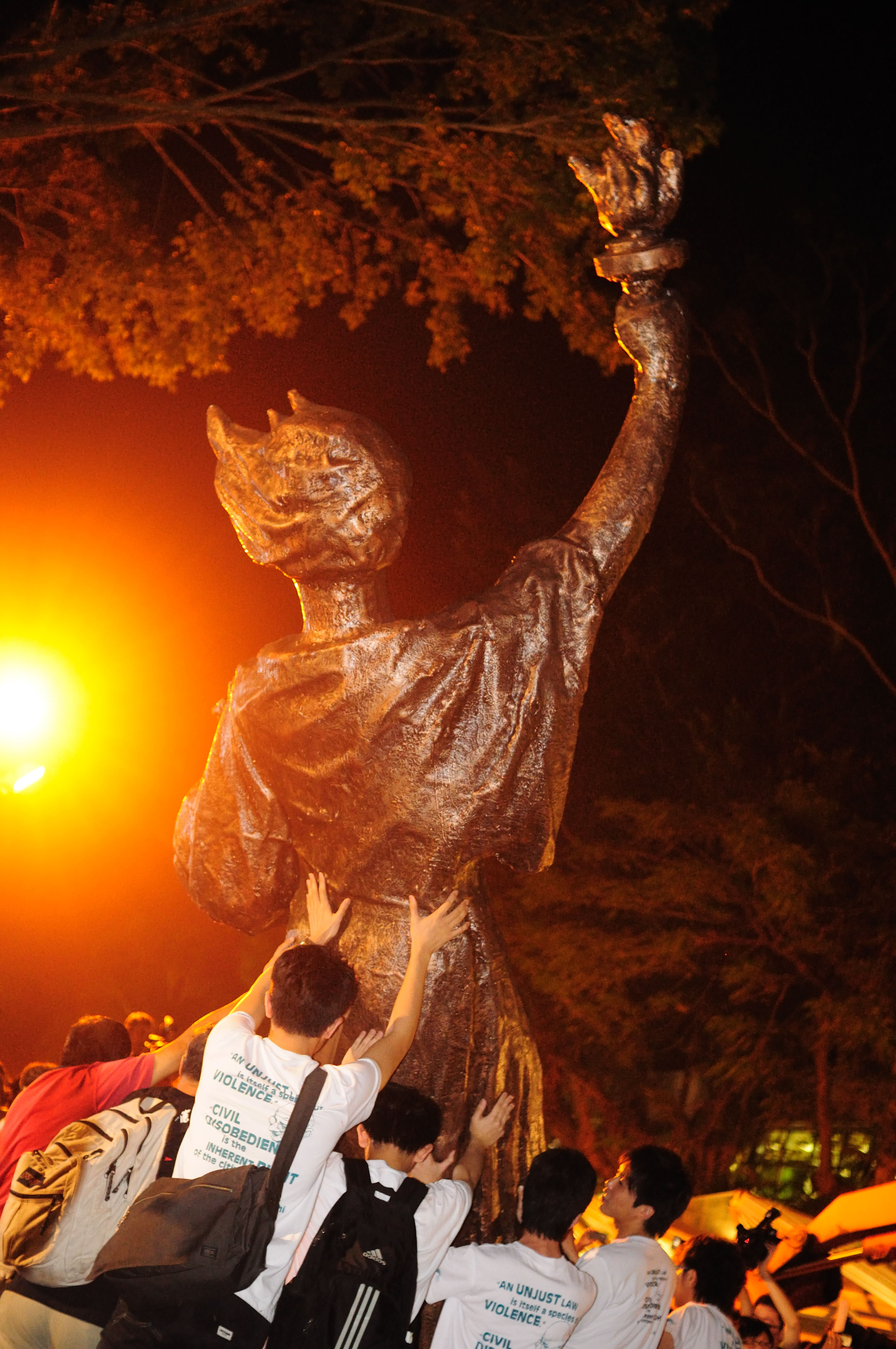 民主女神像 @ 中大